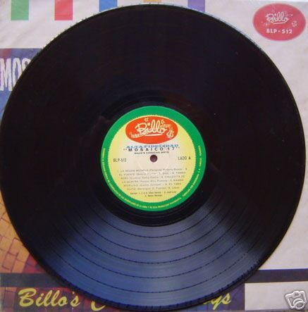 la billo disco acetato